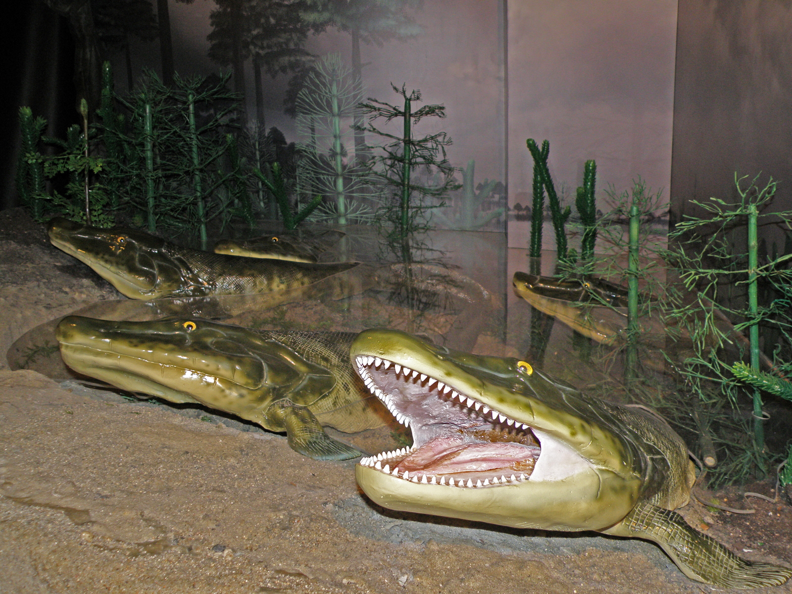 Warszawa, Muzeum Ewolucji PAN - Tiktaalik, rekonstrukcja rzecznego bagna z rybami mięśniopłetwymi